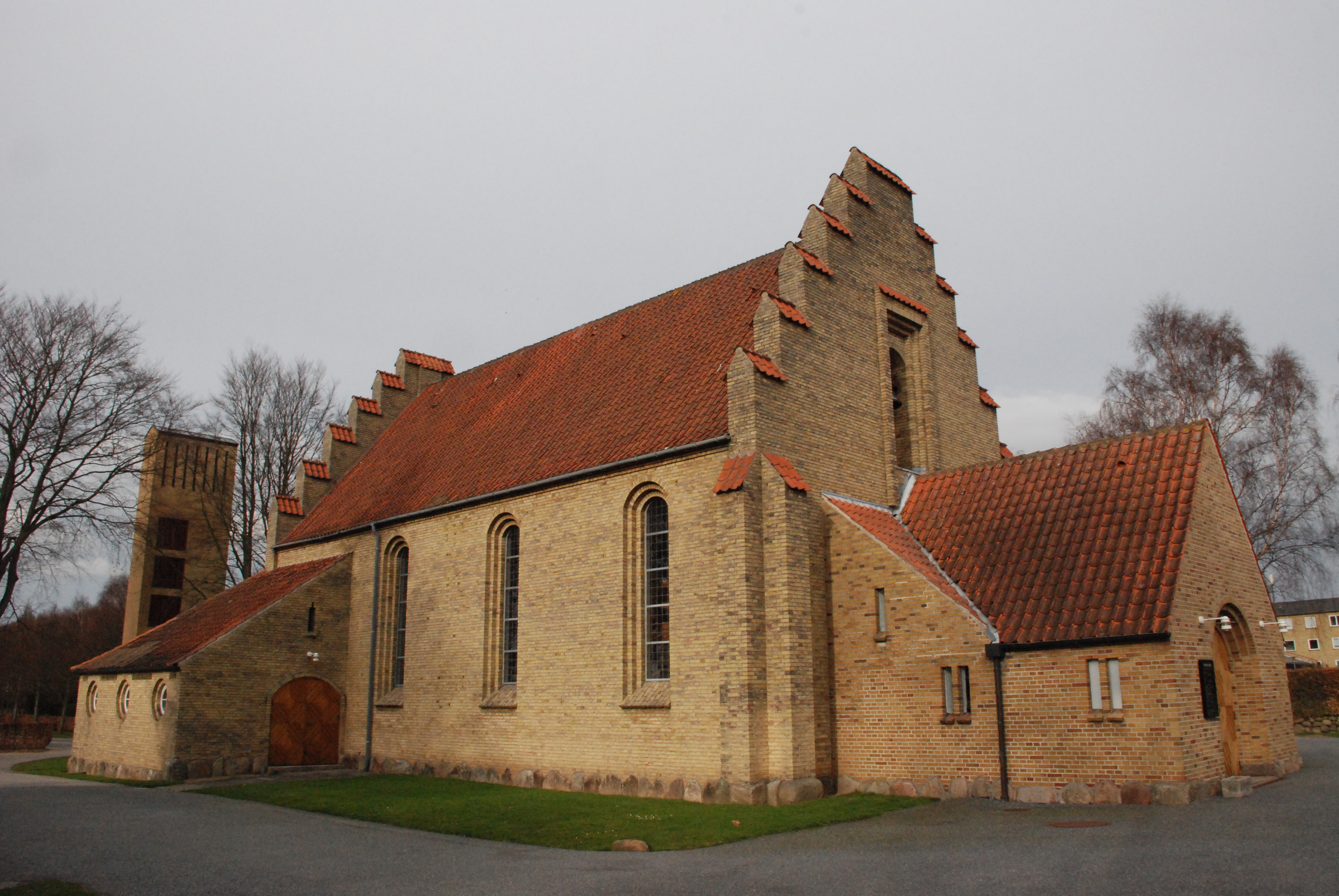 Fredens Kirke, Fredens Sogn, Sunds Herred, Svendborg Amt, Danmark.